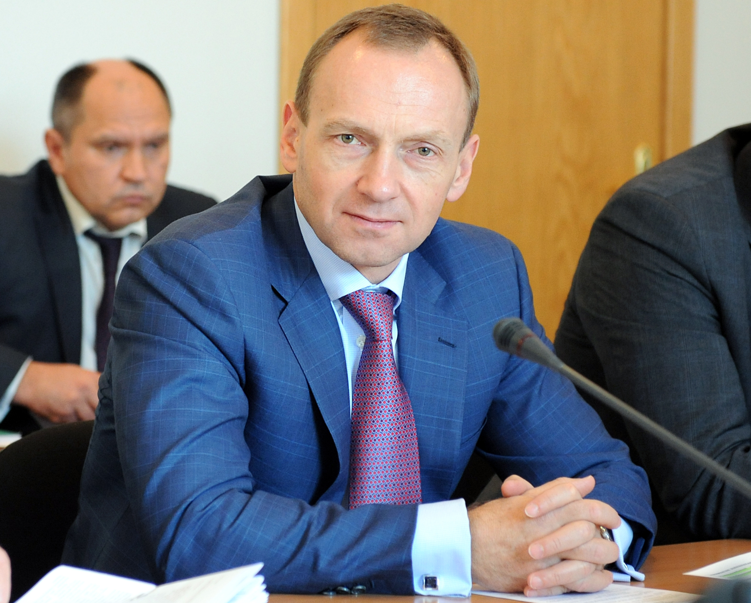 Народний депутат України Атрошенко Владислав Анатолійович